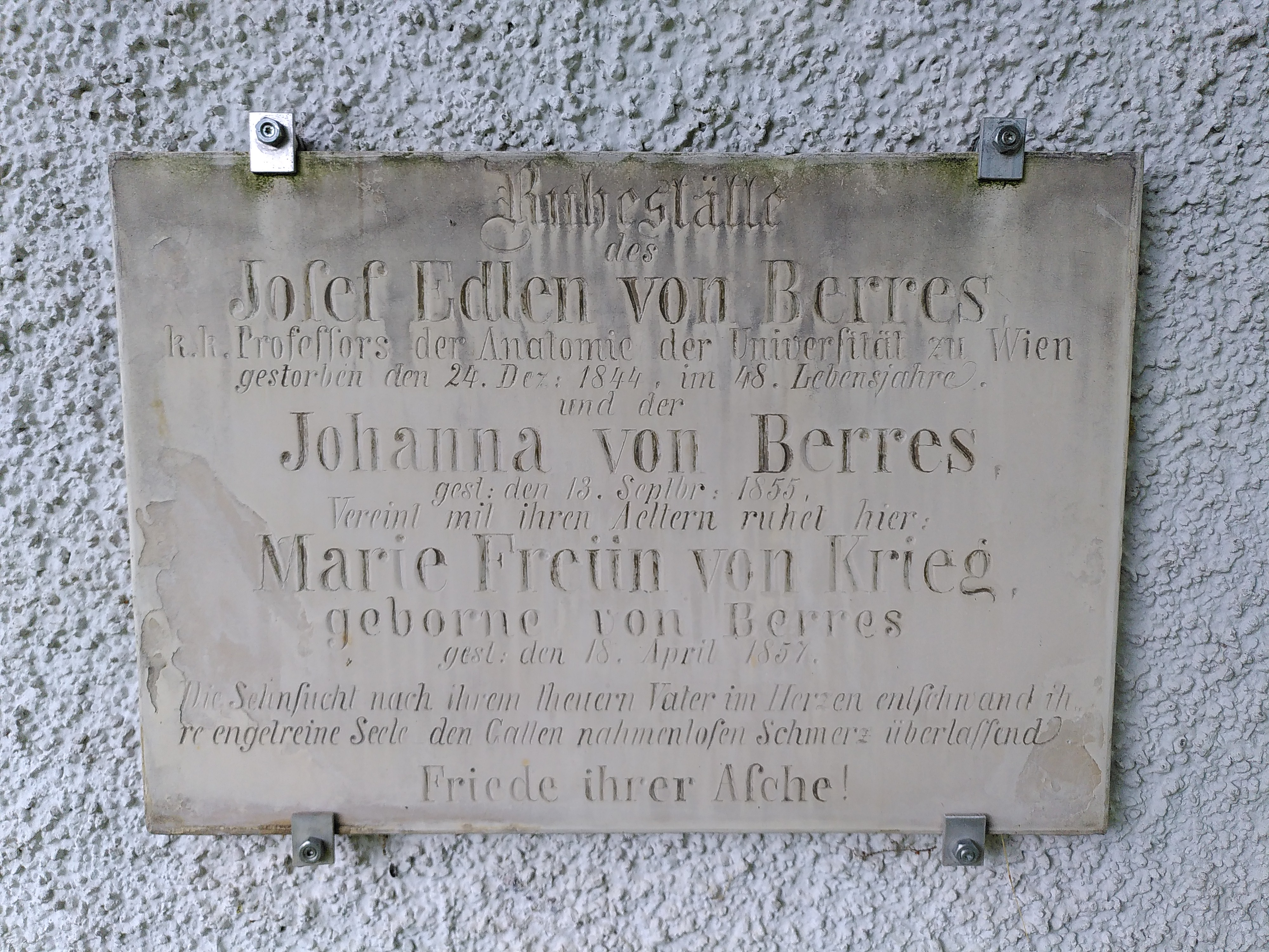 Tafel an Kapelle im Ortsteil "Am Kreuzberg"